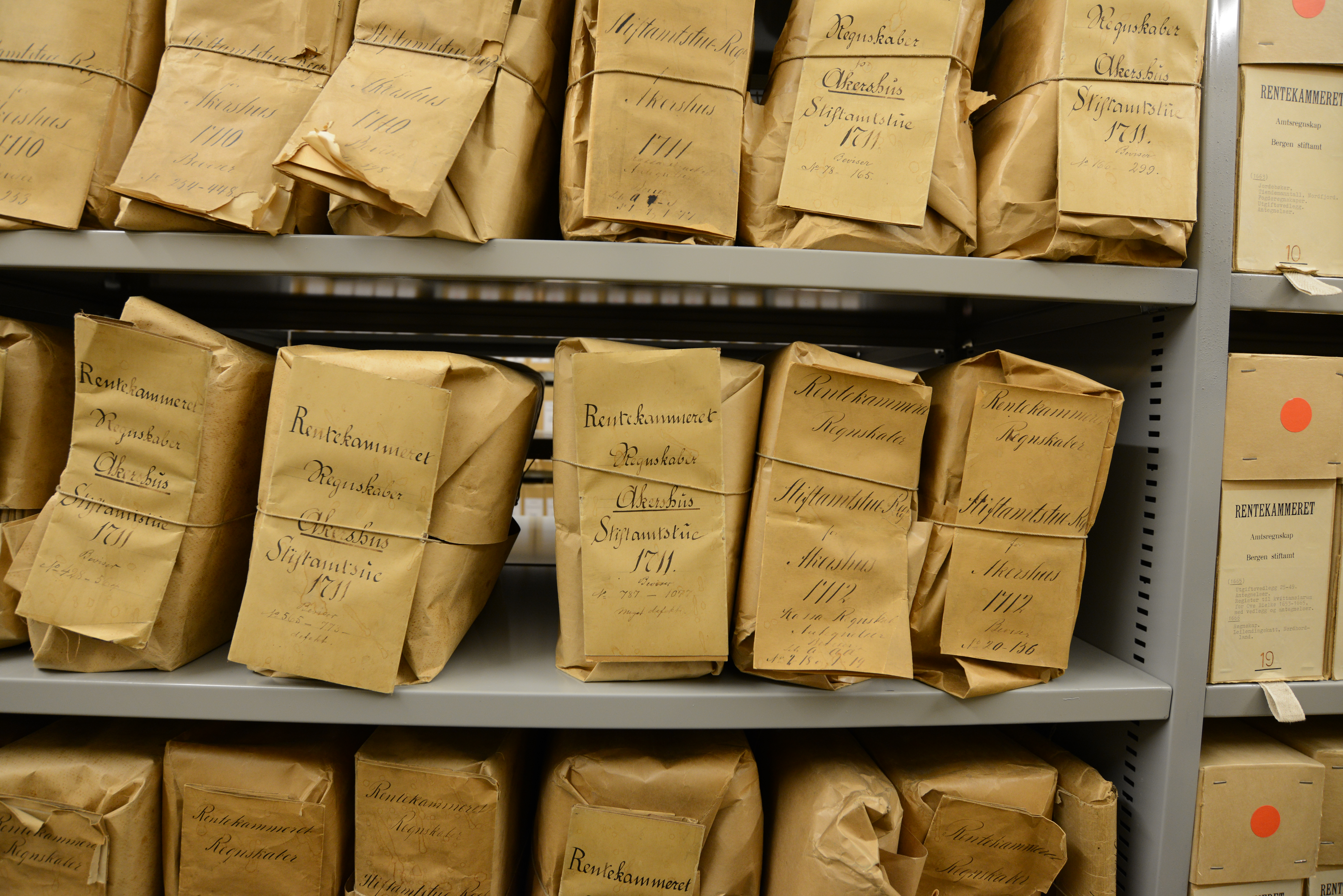 Arkivet etter Rentekammeret ved Riksarkivet.